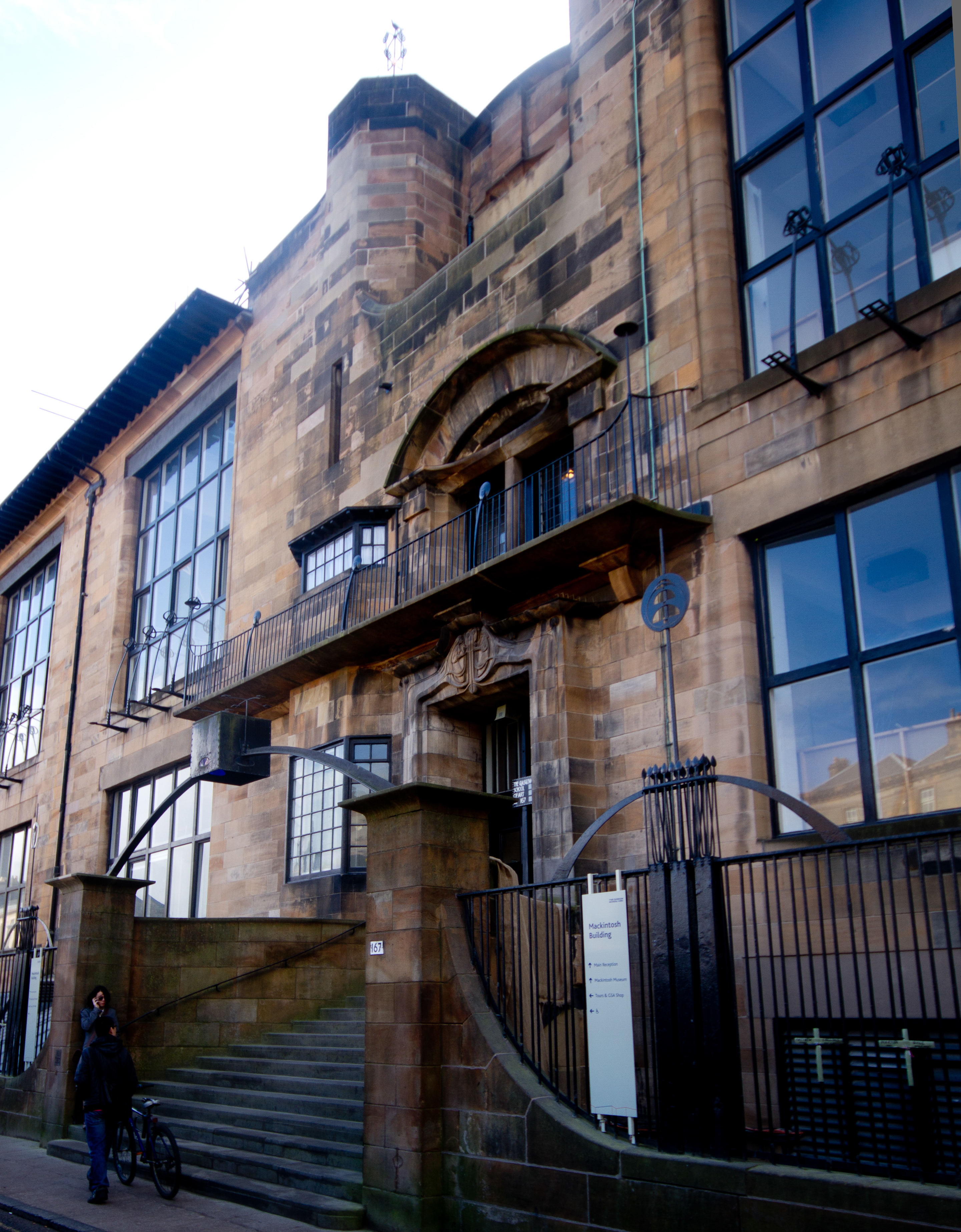 Charles Rennie Mackintosh, Glasgow Scool of Arts